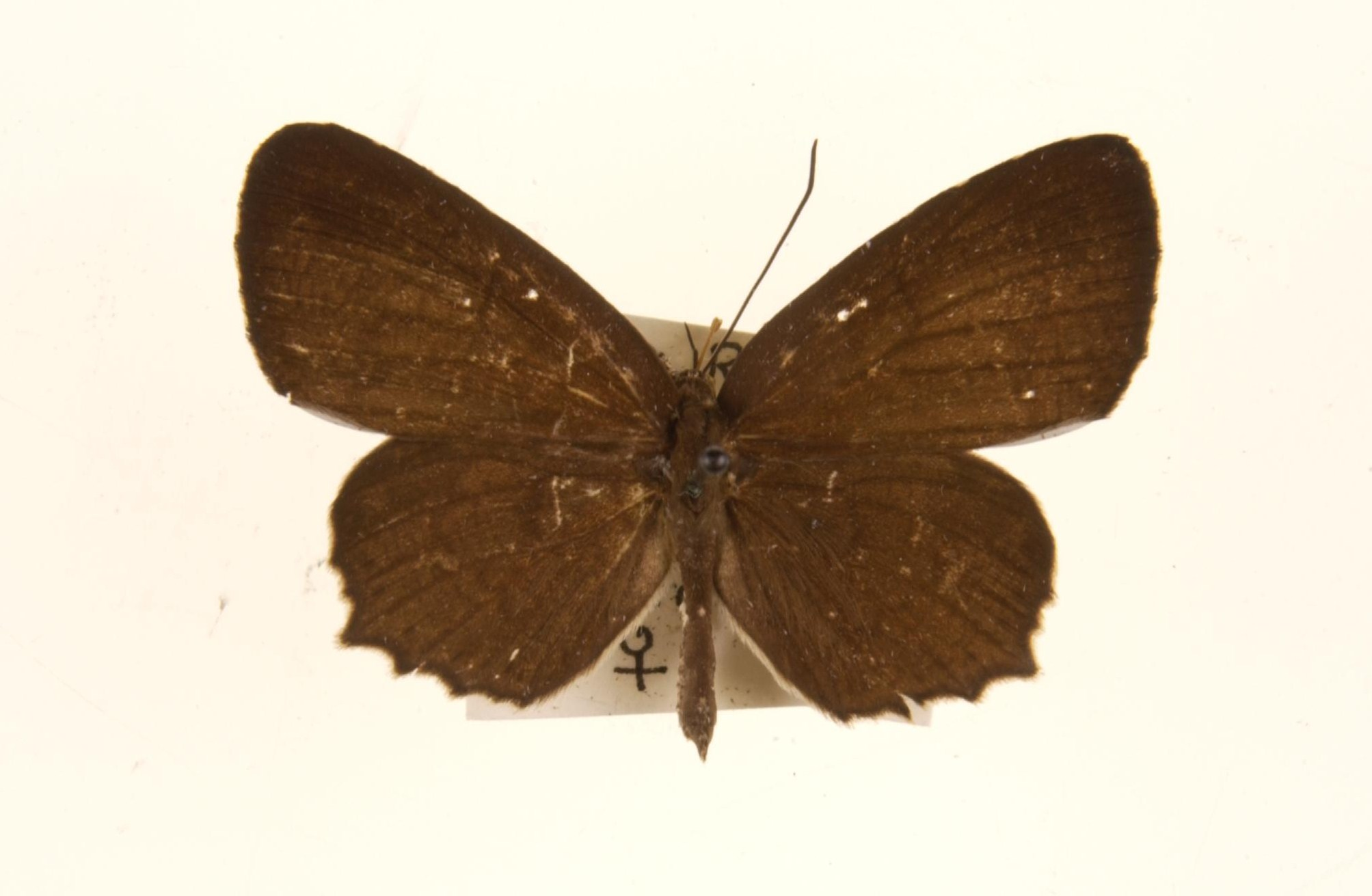 fabius